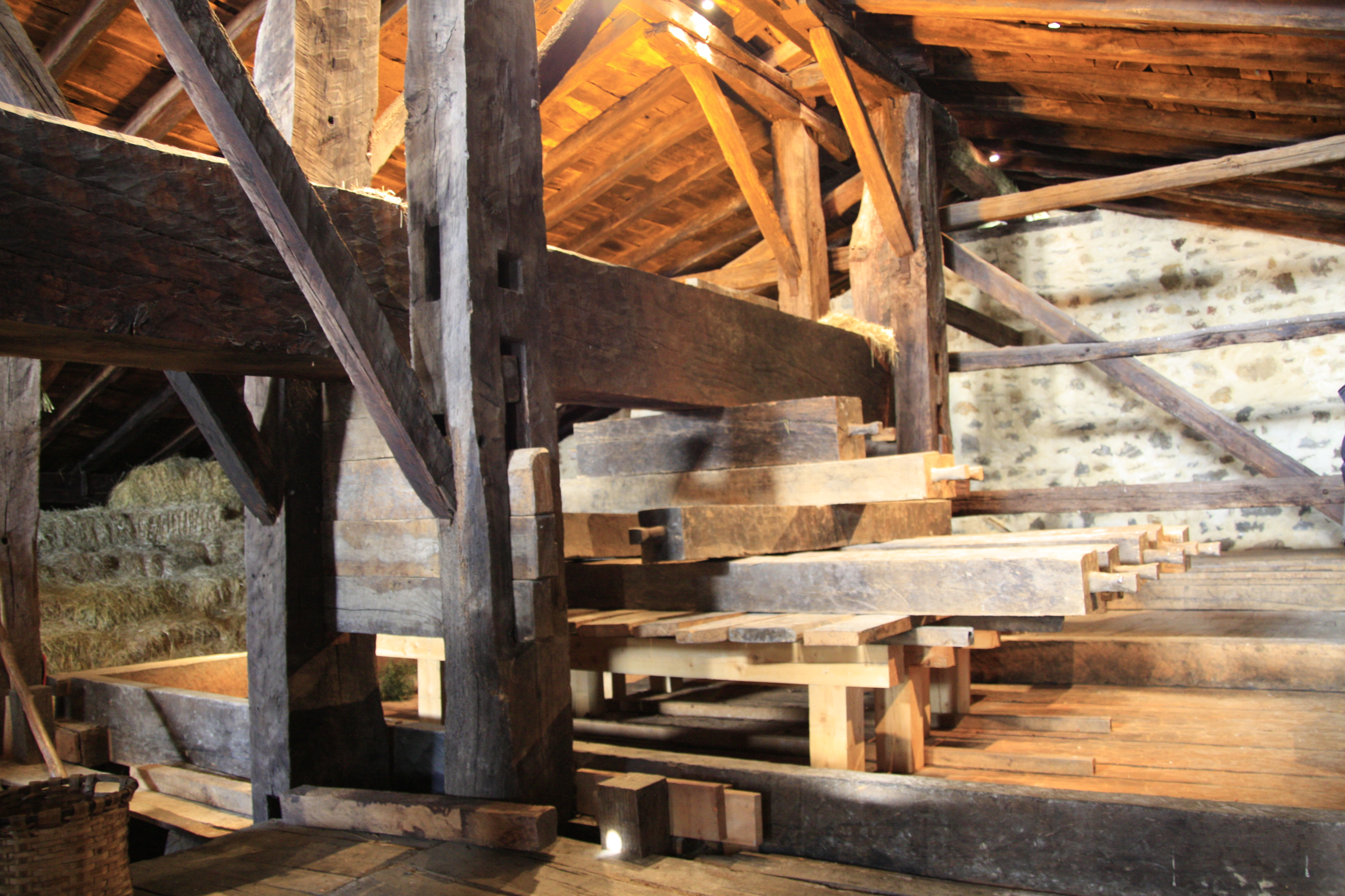 Ezkio-Itsaso udalerriko Igartubeiti Baserri Museoko tolarea. Gipuzkoa, Euskal Herria. A cider-maker house inside Igartubeiti Farm Museum in Ezkio-Itsaso village. Guipuscoa, Basque Country.